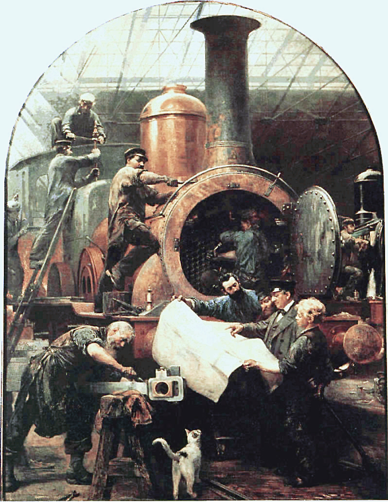 Eisenbahnbau bei Borsig